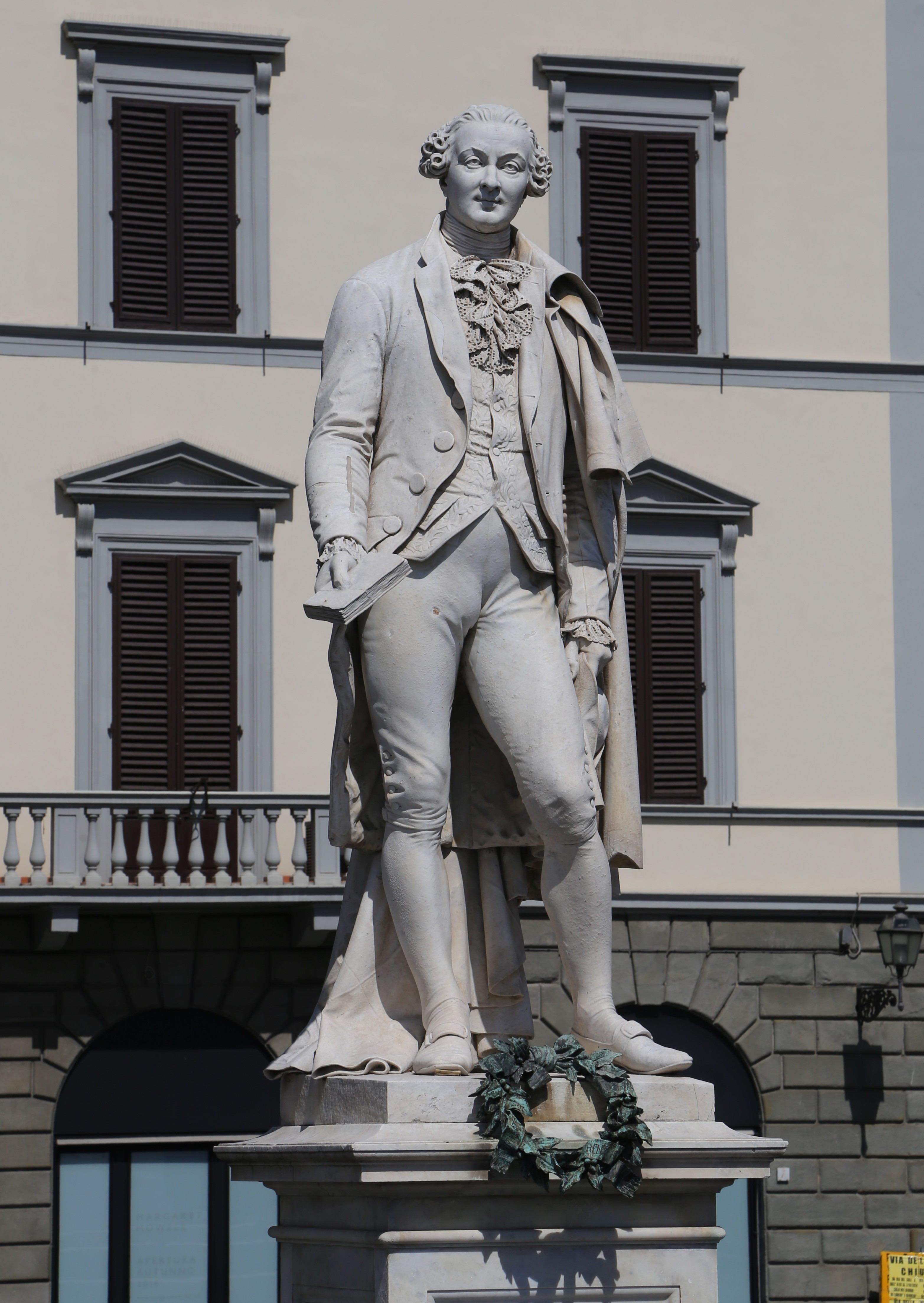 Statue Carlo Goldoni, Piazza Goldoni, Florenz